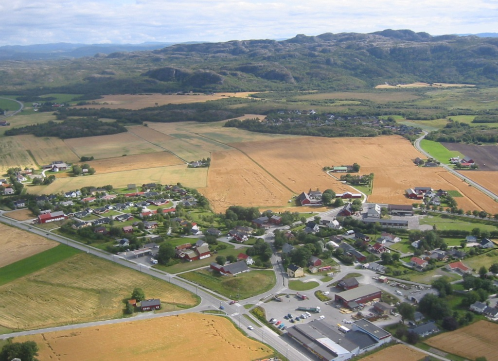 From Ørland (Ørland), Sør-Trøndelag Norway. Village Opphaug